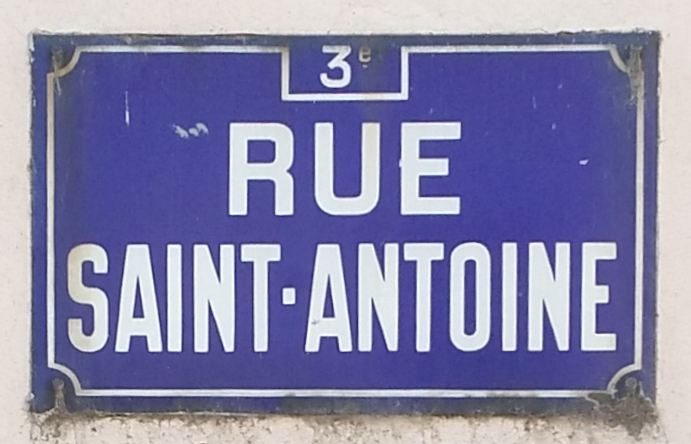 Plaque de la rue Saint-Antoine, dans le 3e arrondissement de Lyon.